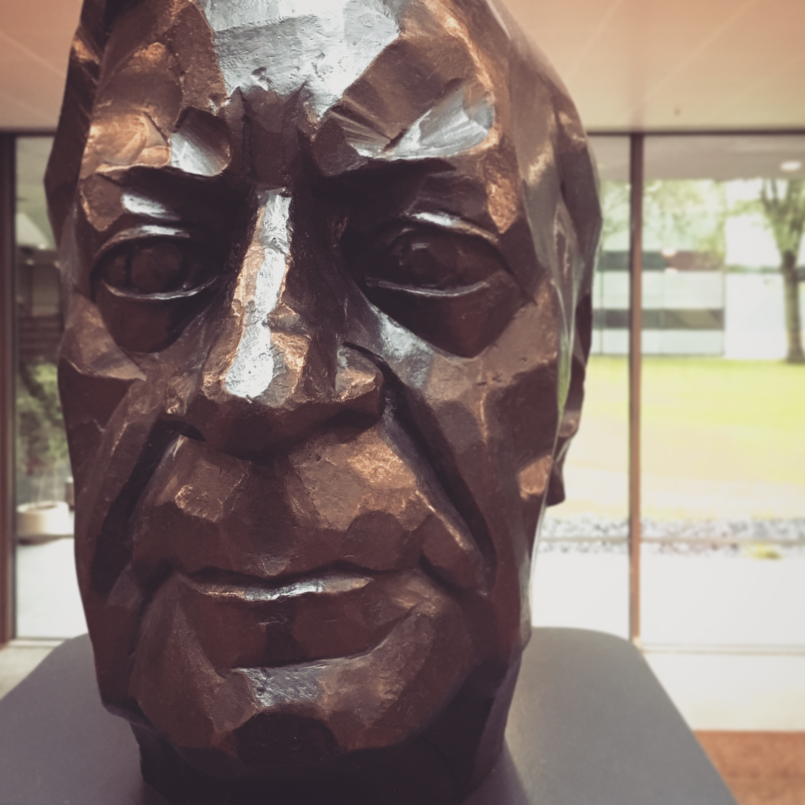 Büste von Helmut Schmidt auf dem Roten Platz der Helmut-Schmidt-Universität